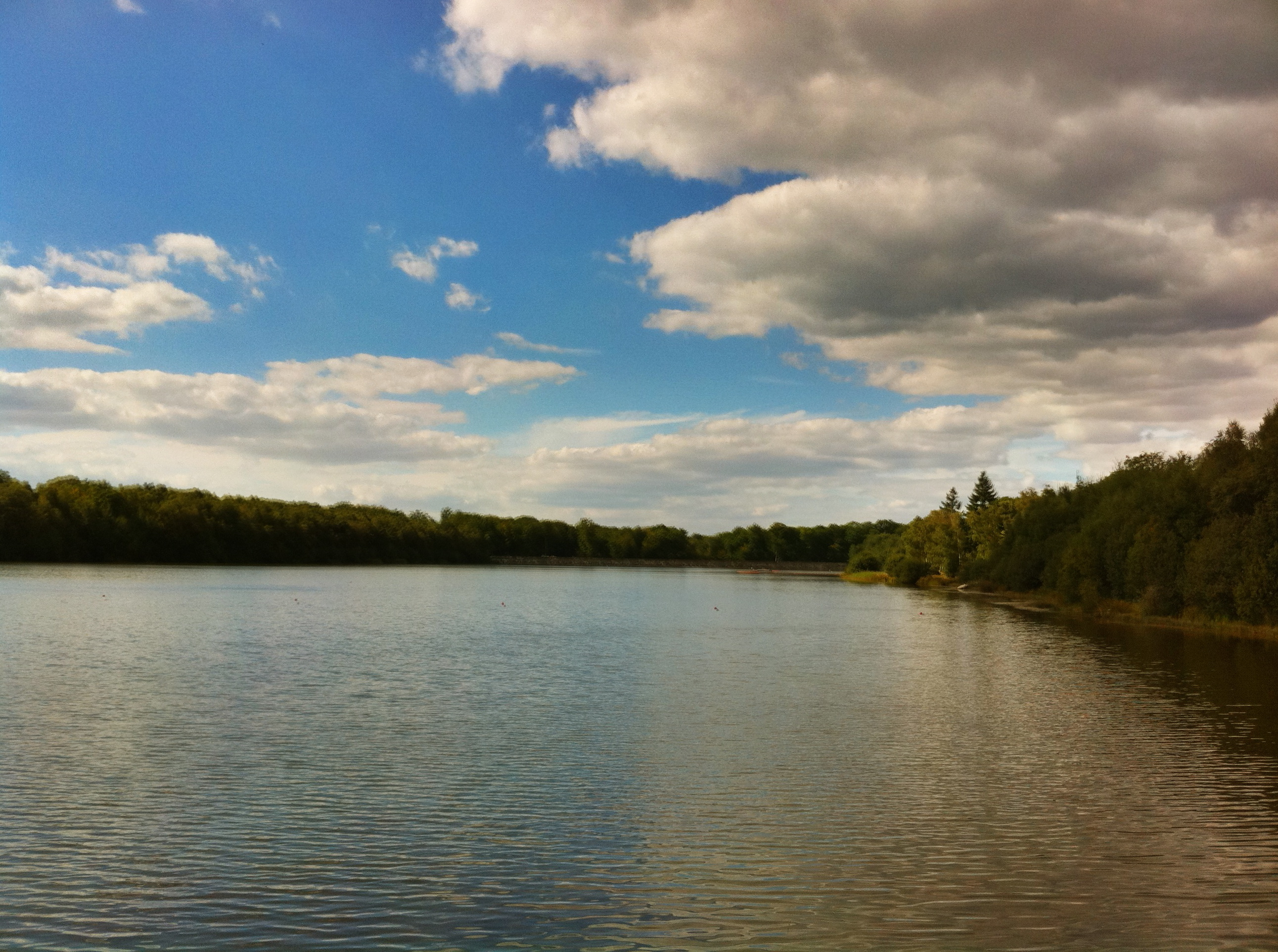 Etang de hollande